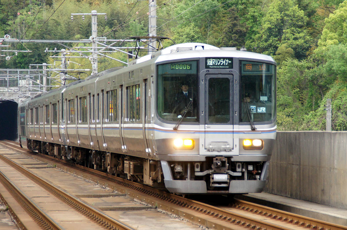 JR西日本223系5000番台（瀬戸大橋線）